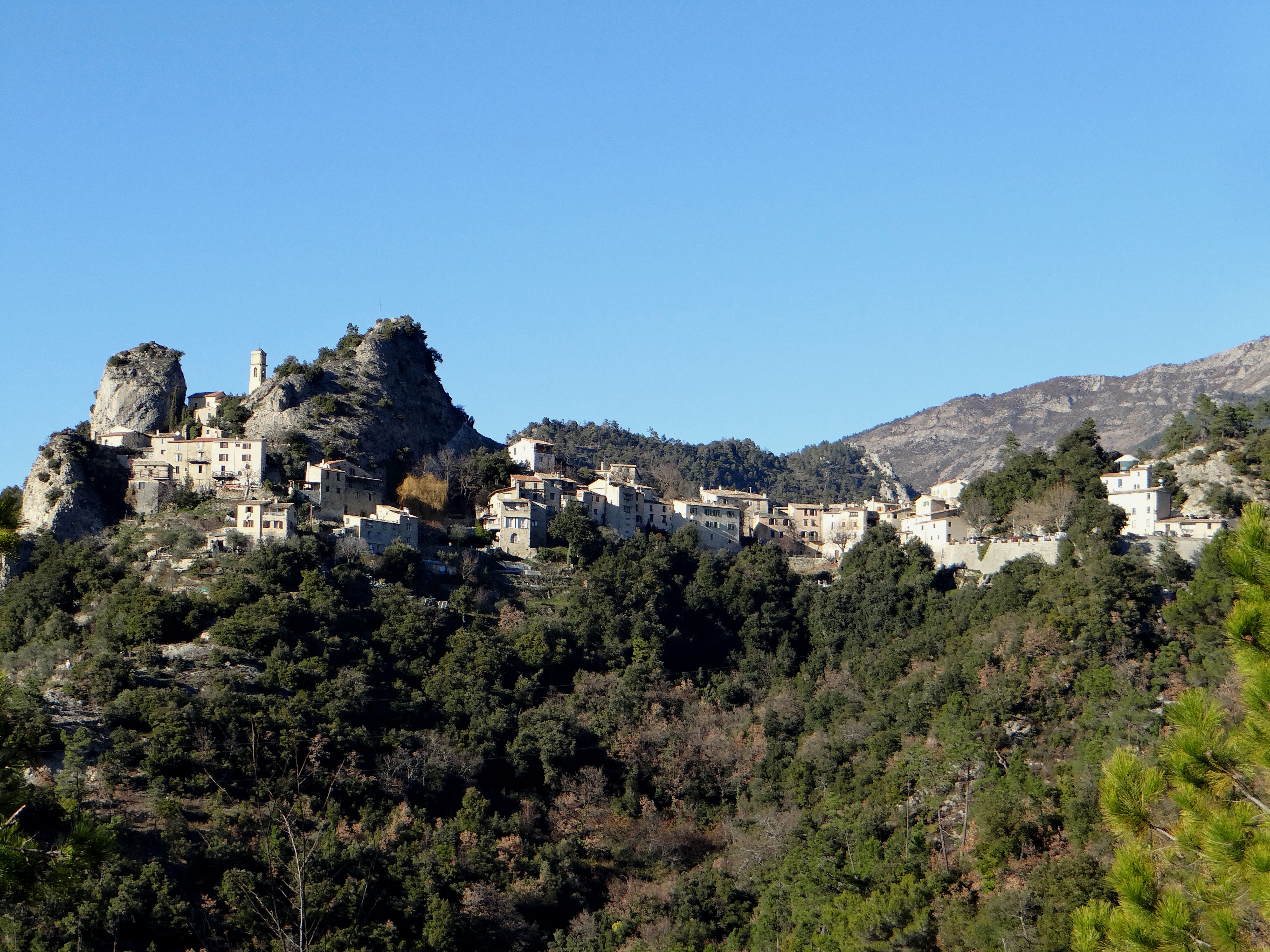 Pierrefeu - Vieux-Pierrefeu - Vue d'ensemble